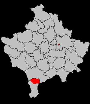 Vendndodhja e Sharrit.